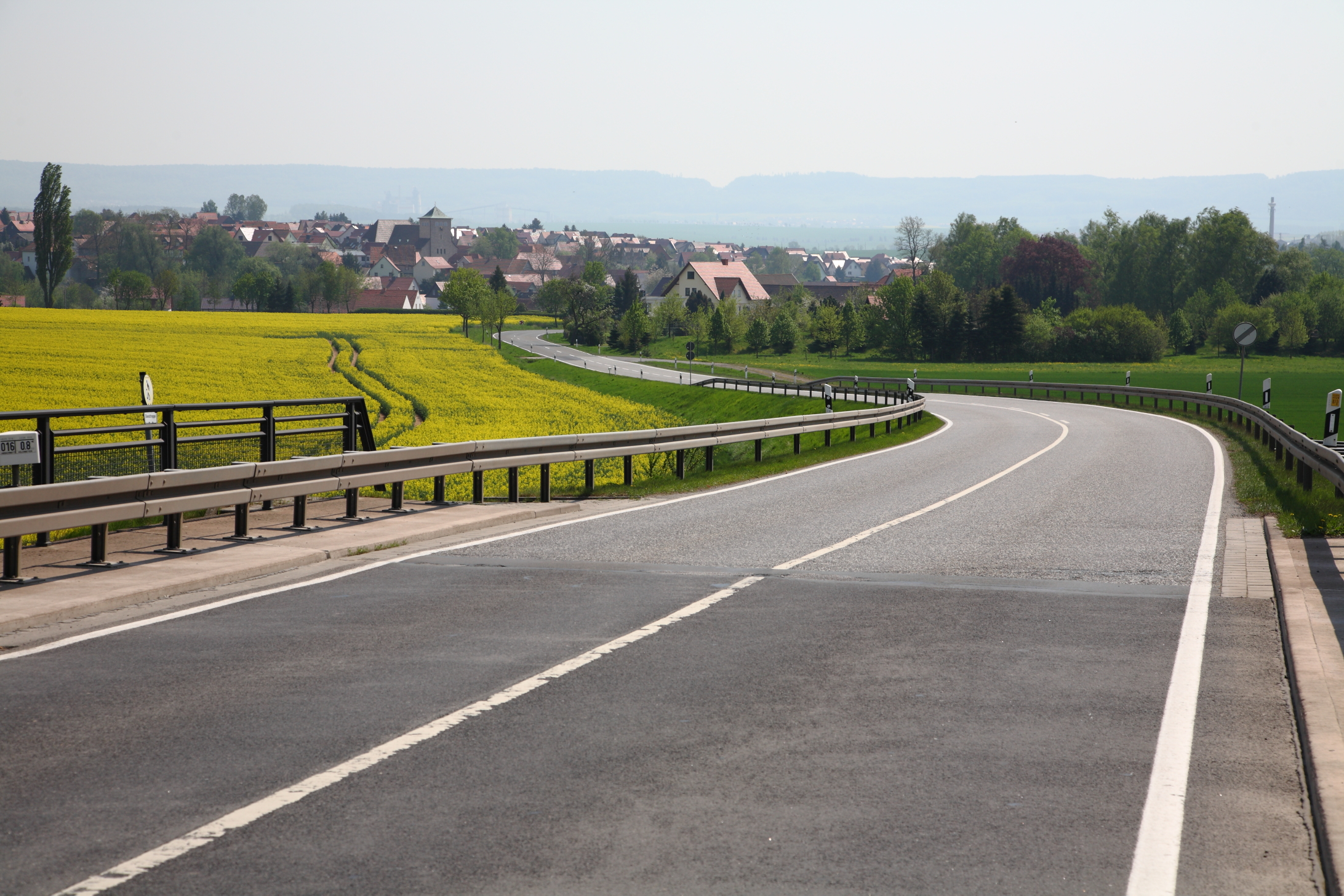 Die Landstraße L1015 Richtung Gernrode (Landkreis Eichsfeld in Thüringen),(im Hintergrund ist der Bergkamm des östlichen Dün zu sehen)